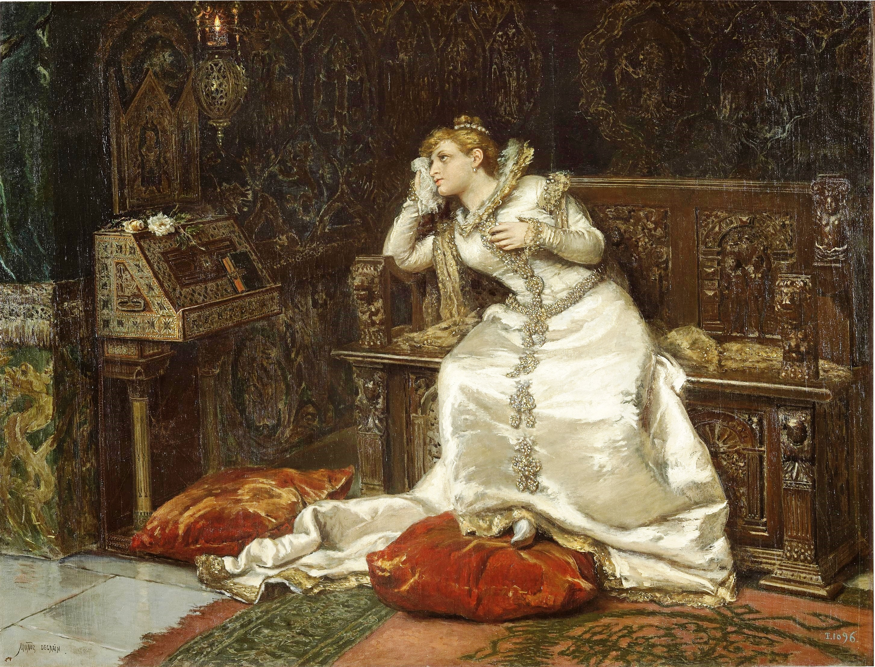 La obra representa a Desdémona, la protagonista femenina del célebra dama Otelo, escrito por William Shakespeare.